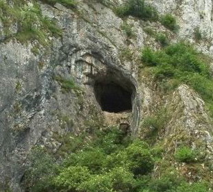 "Peştera lui Balica" din Cheile Turzii